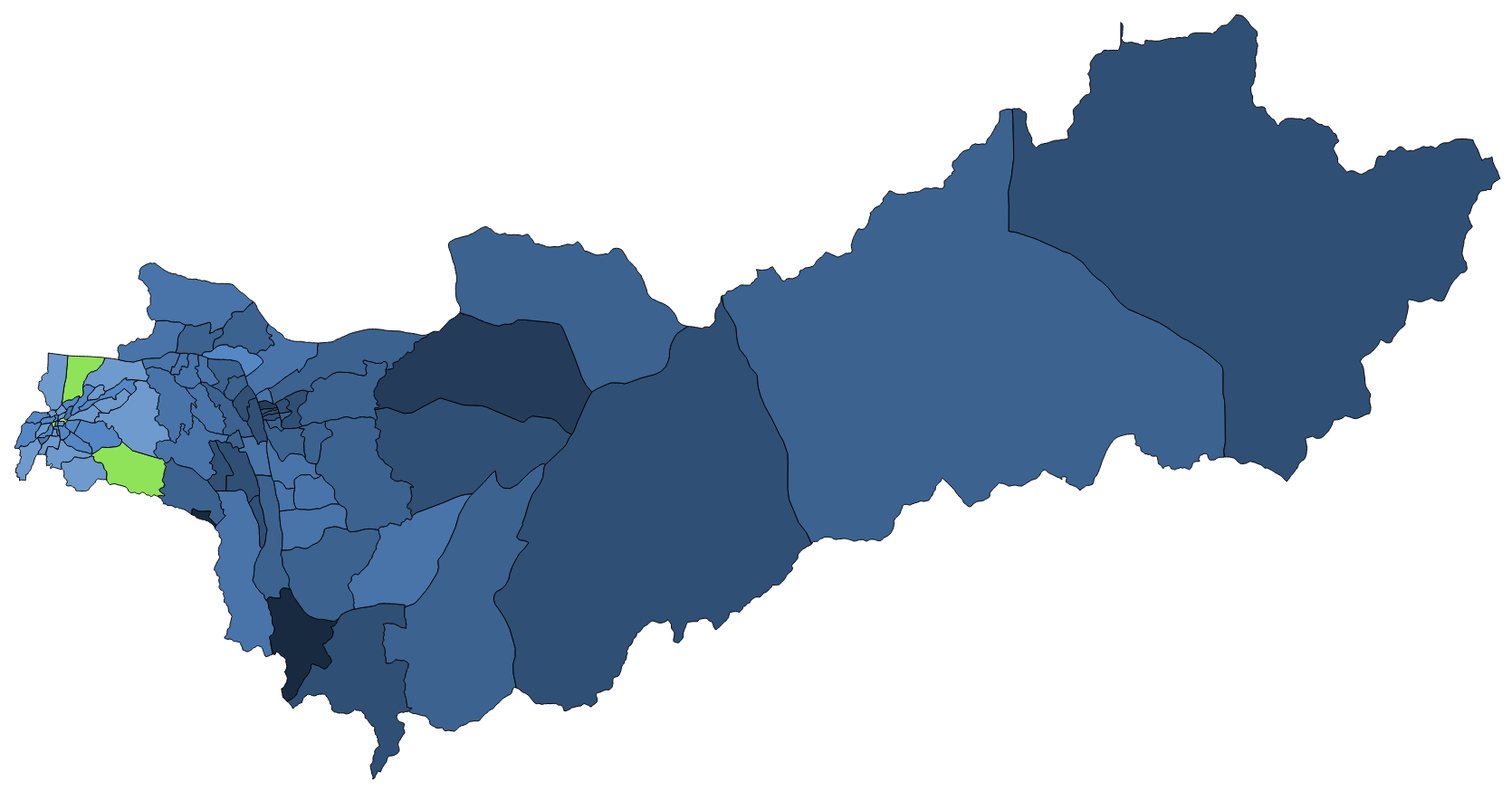 顏色對照表